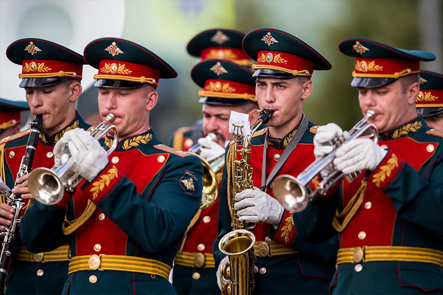 Открытие Международного военно-технического форума «Армия–2016». Московская область, парк «Патриот», 6 сентября 2016.